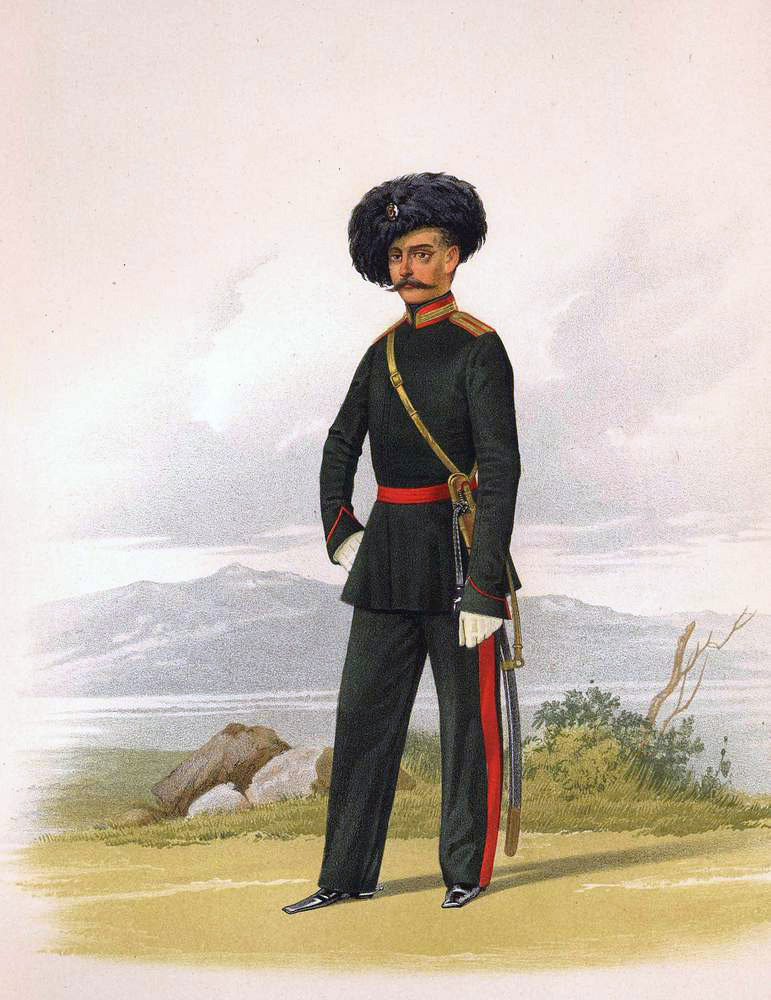 Обер-Офицер эскадрона Сибирского Кадетского корпуса, 7 апреля 1856. (В парадной форме).